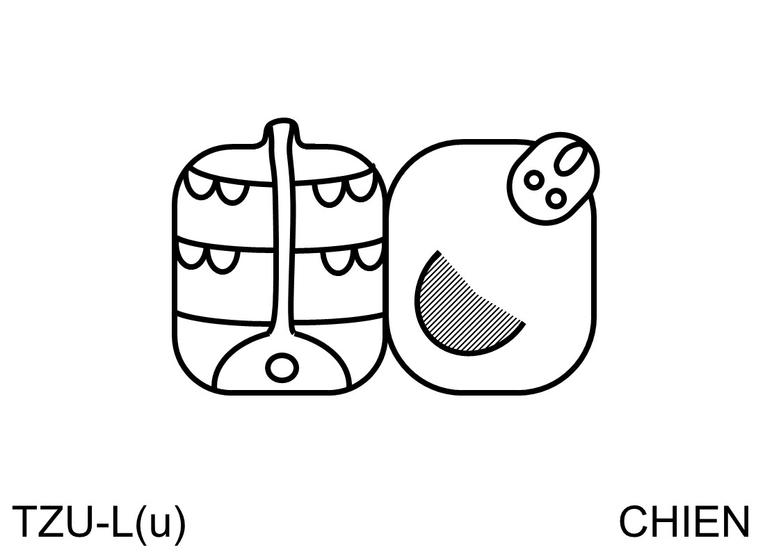 Glyphe maya TZUL = Le chien